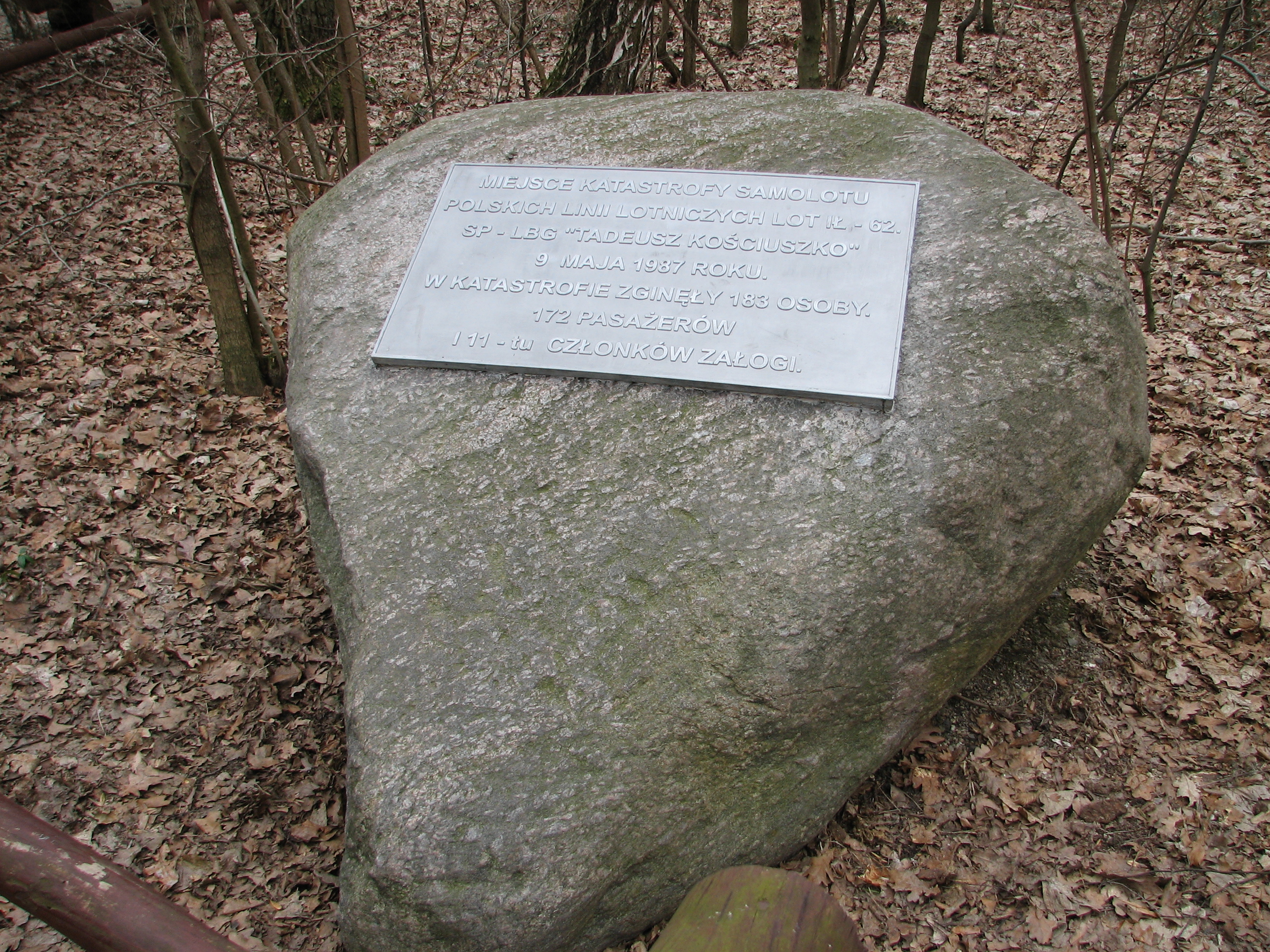 Miejsce katastrofy samolotu Ił-62M SP-LBG "Tadeusz Kościuszko" zaistniałej 9 maja 1987 roku. Warszawa, Las Kabacki al. Załogi Samolotu Kościuszko